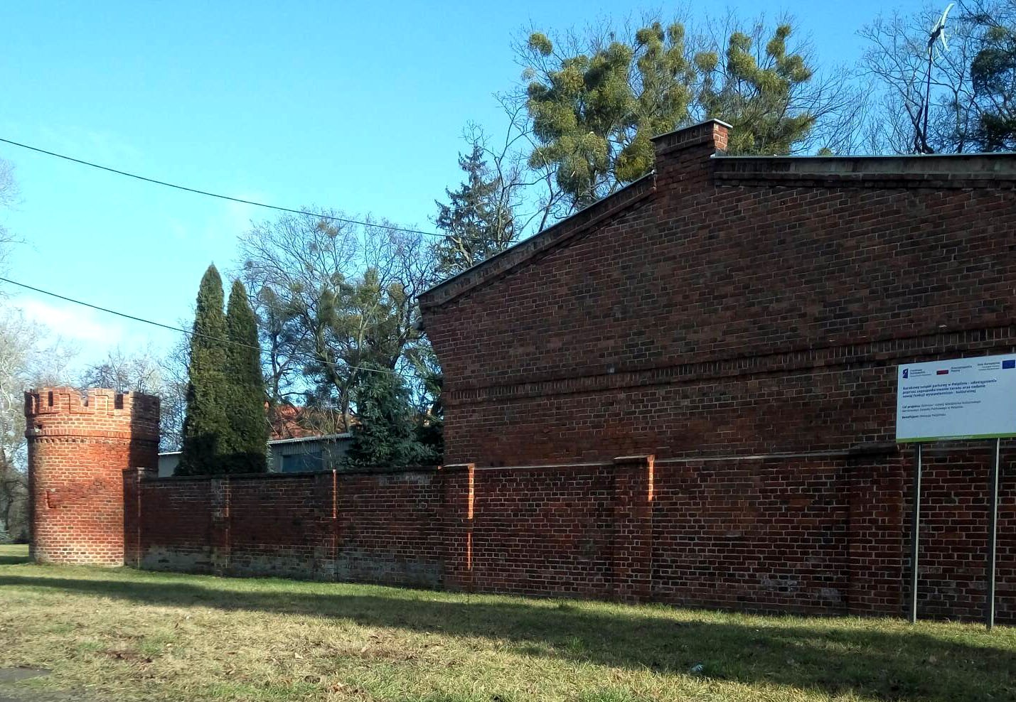 Wieżyczki muru